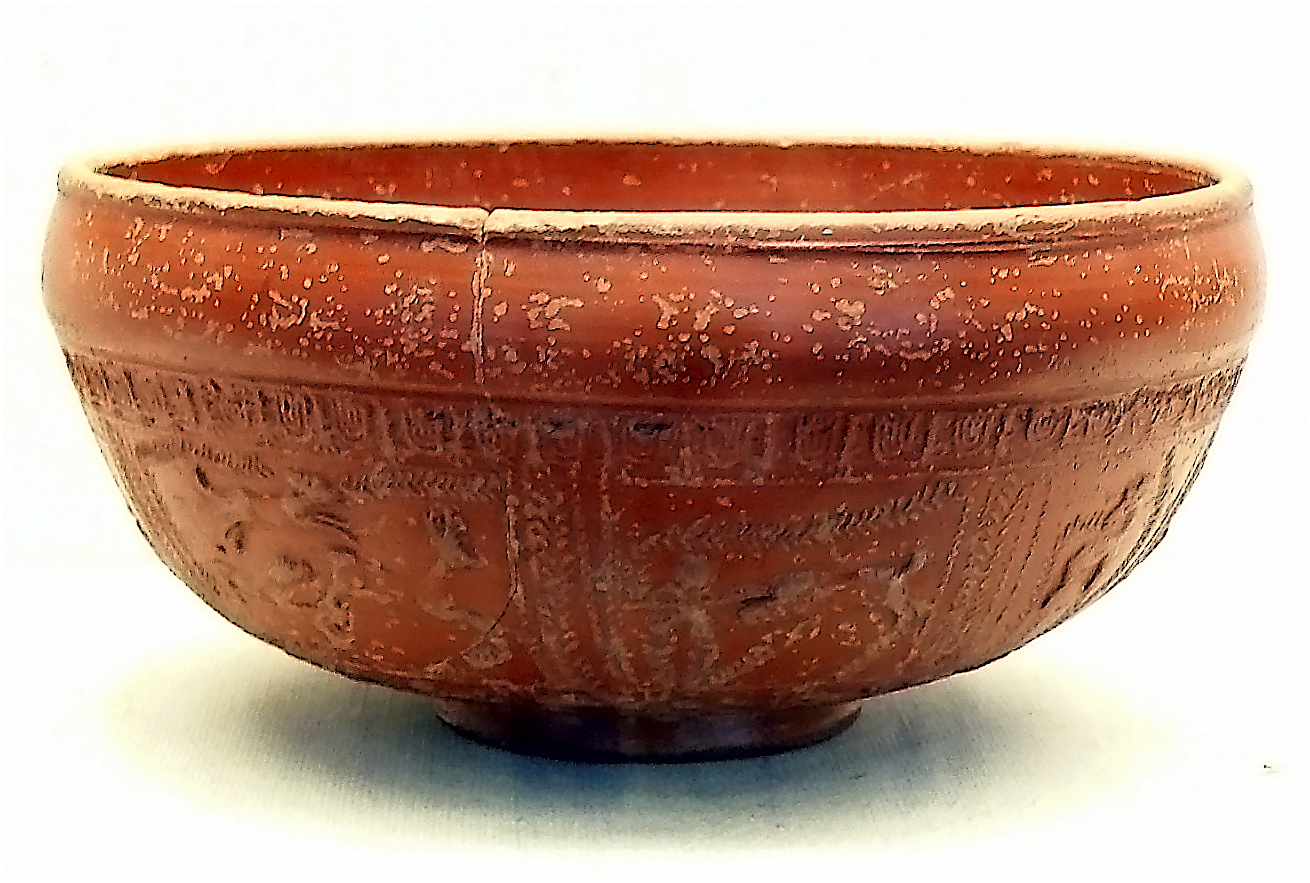 Cerámica romana (Terra sigillata), de la provincia de Valladolid, España